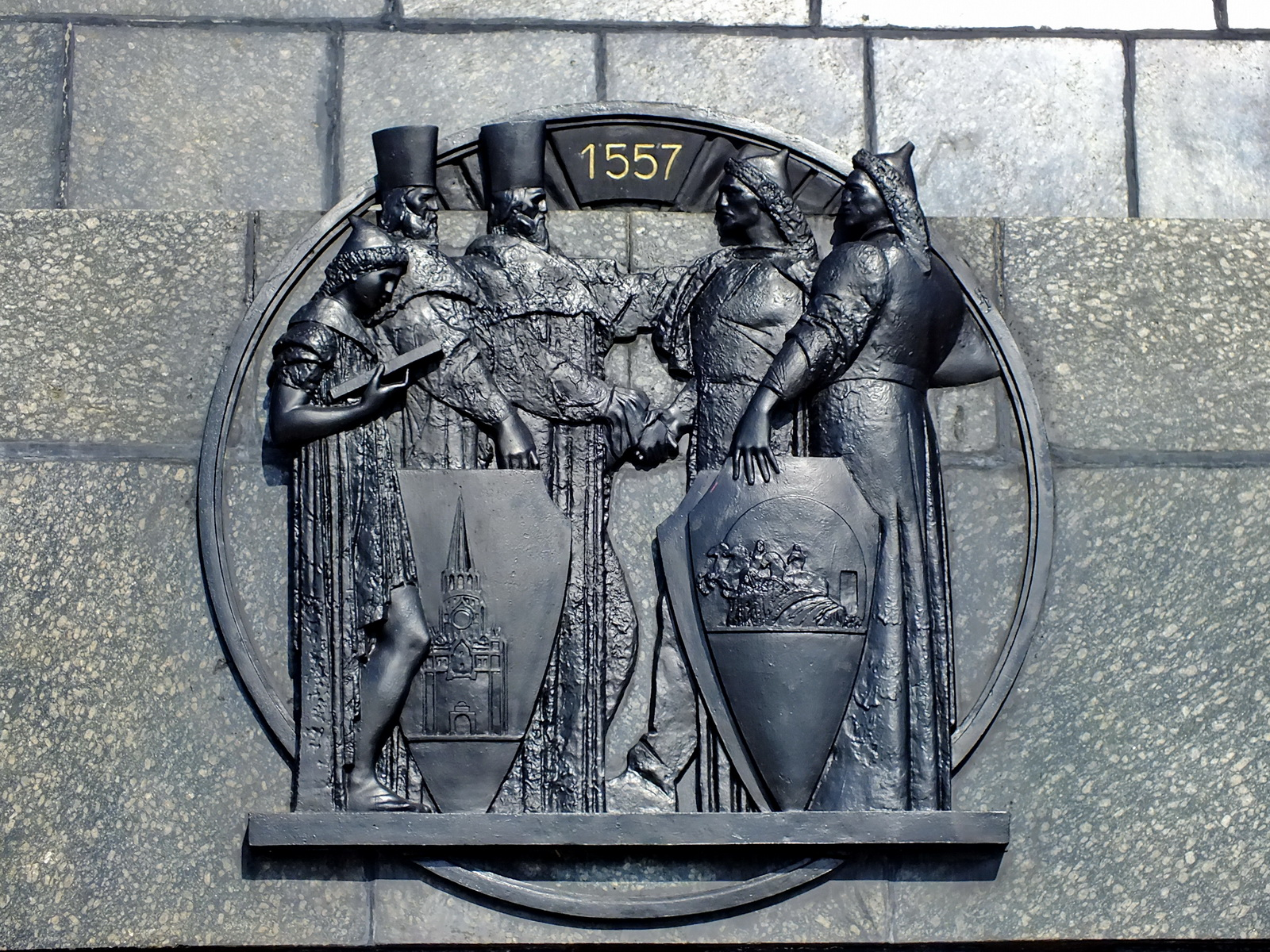 Монумент Дружба в честь 400-летия добровольного присоединения Башкирии к России: площадь Первомайская, Уфа, Башкортостан